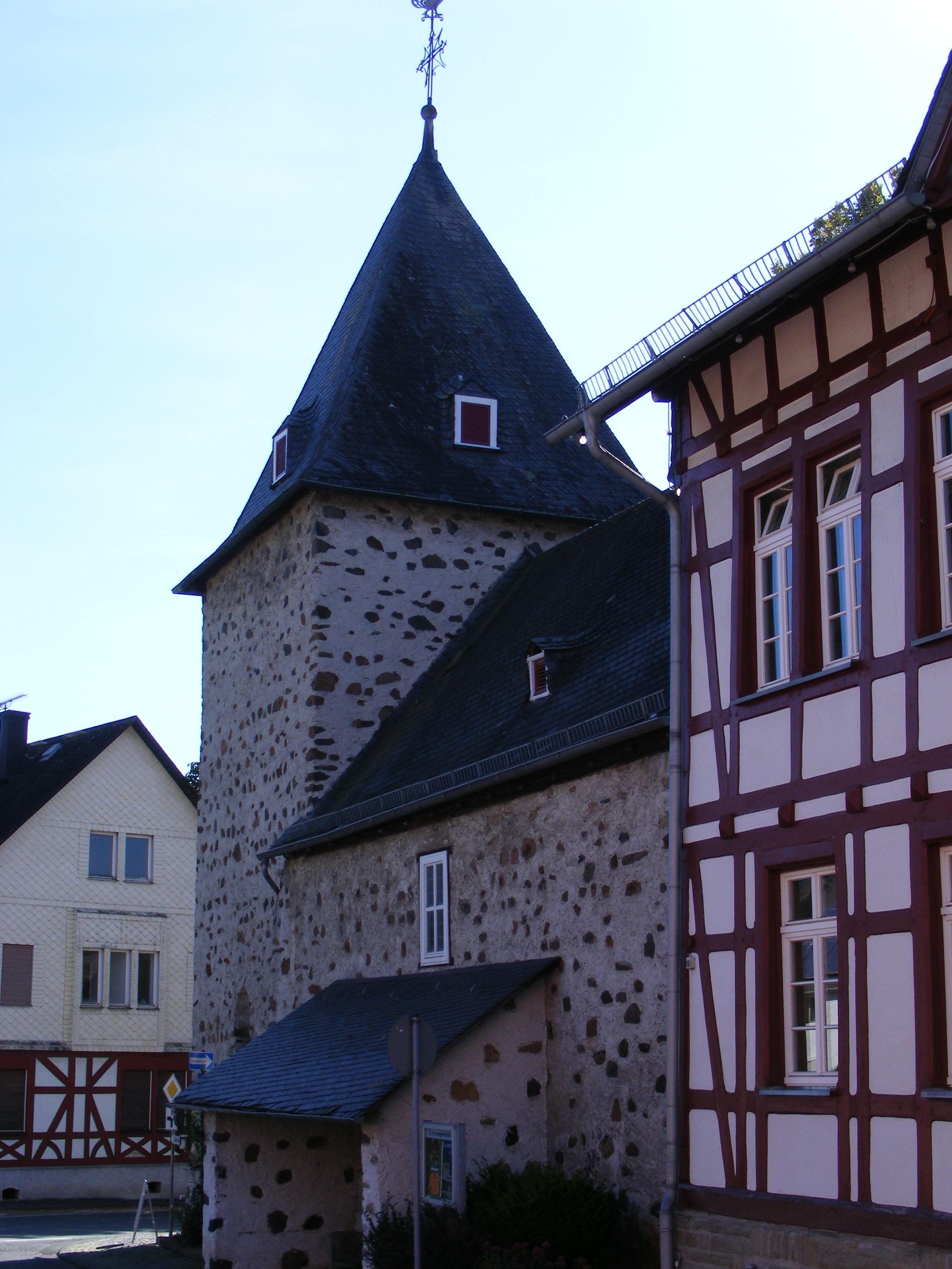 Greifenstein Allendorf Kirche 2